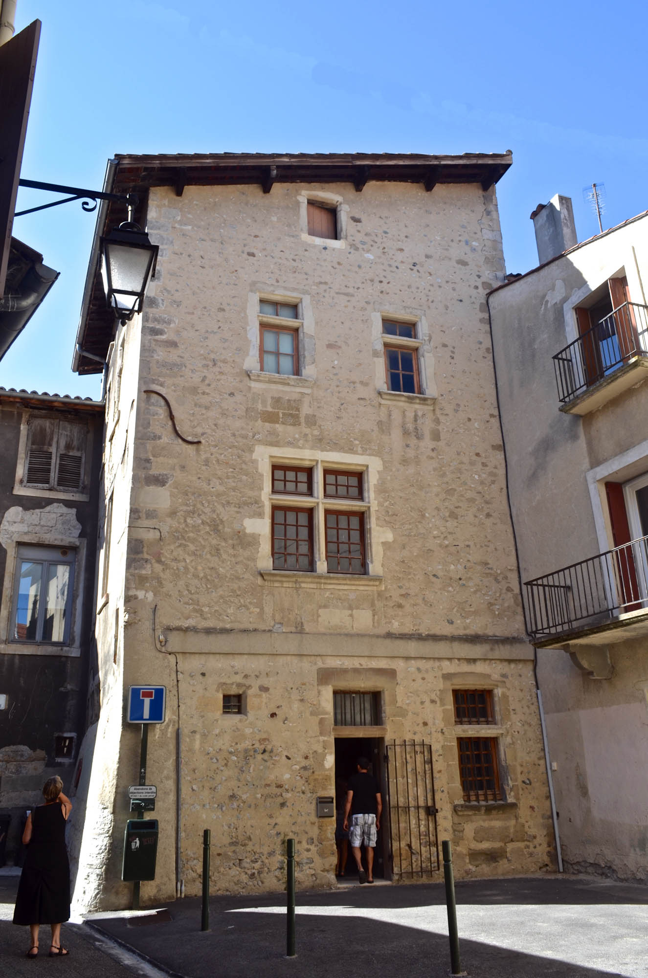 Maison Dupré-Latour, à Valence (Drôme, France), XVIe s. Façade arrière.